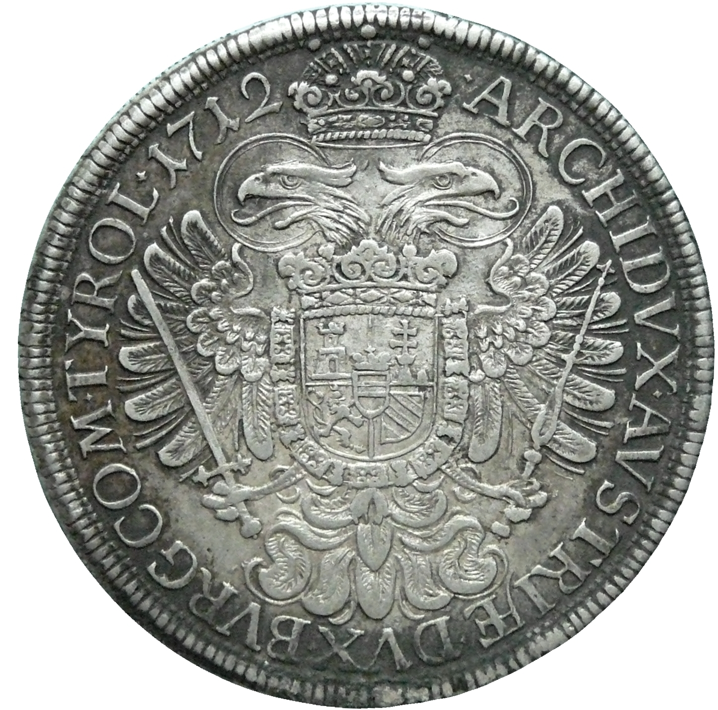 Österreichischer Reichsspeziestaler Antrittstaler 1712 Kaiser Karl VI. Vom Reichsmünzfuß abweichende Prägung 8,11 Stück a.d.r. Mark, 9,24 Stück a.d.f. Mark Silber 14 Lot 1 Grän = 878,5‰ Feingewicht: 25,318 g Raugewicht: 28,82 g nach Reichsmünzdeputation von 1623 Prägung 1712-1718 Münzstätte Wien Münzmeister Franz Joseph Mittermayer von Waffenberg (1709-1726) Münzeisenschneider Johann Michael Hoffmann (1680-1736) Außerkurssetzung nach Einführung des Konventionsmünzfußes 1748 für 1 Taler 10 Groschen Konventionsgeld Gewicht: 28,51 g Durchmesser: 43,16-43,55 mm Dicke: 2,43 mm Laubrand Nimbierter Doppeladler unter schwebender Kaiserkrone, in den Fängen Schwert und Zepter, auf der Brust gekröntes viergeteiltes Wappenschild mit den Wappen von Burgau, Ungarn, Böhmen und Burgund und gekröntem Herzschild mit dem Bindenschild, umgeben von Kette vom Goldenen Vlies; Fortsetzung der Titelumschrift mit Schnurkreis oben nach Krone beginnend nach rechts: ARCHIDUX AUSTRIAE DUX BURGUNDIAE COMES TYROLIS Erzherzog von Österreich, Herzog von Burgund, Graf von Tirol